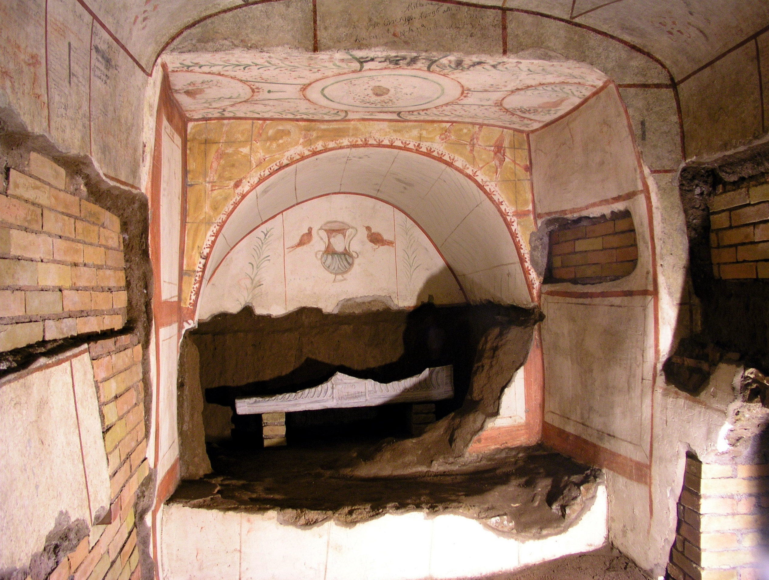 Rom, Domitilla-Katakomben, Wandgräber mit Fresken